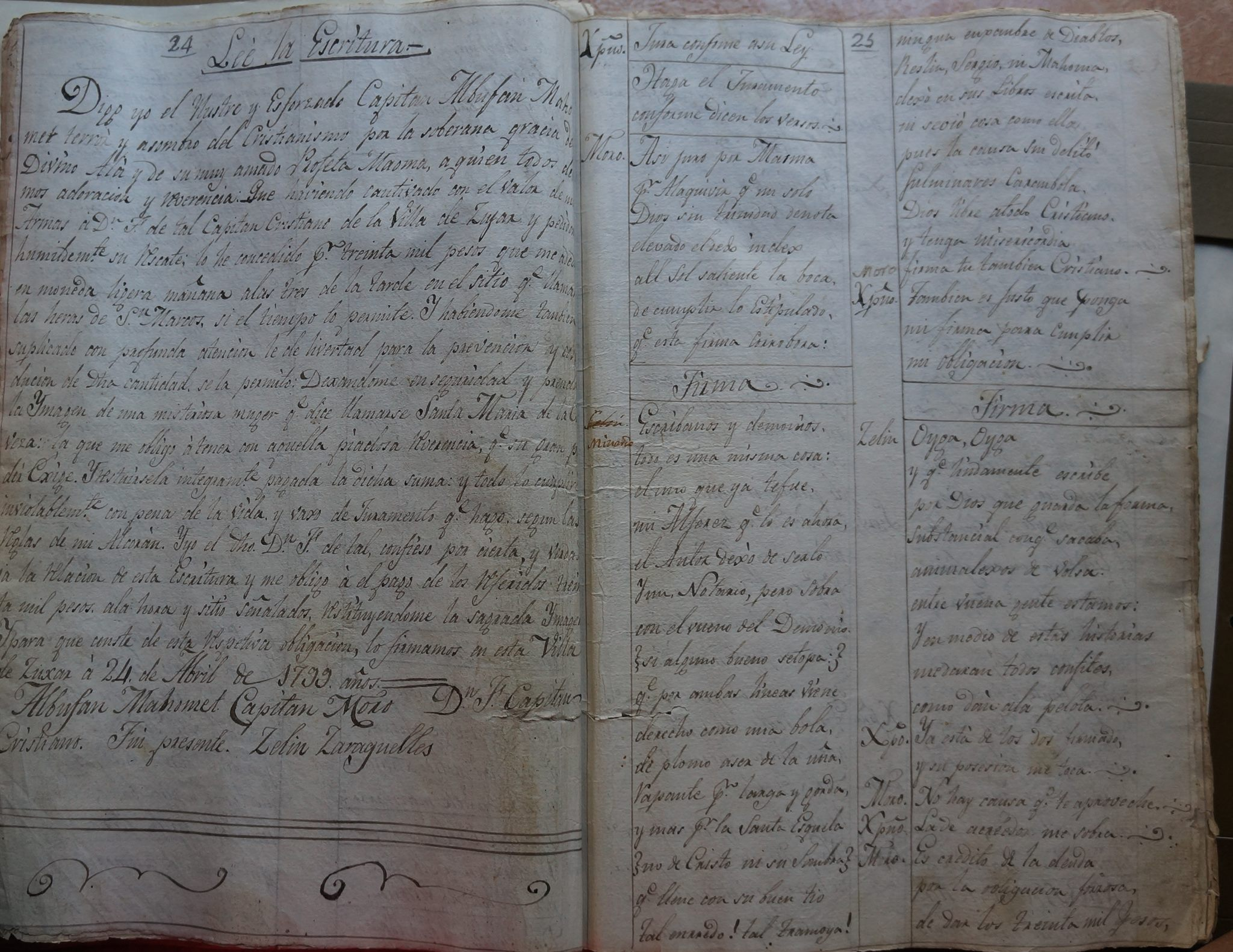 Páginas del Manuscrito que verifican la fecha de estos Papeles